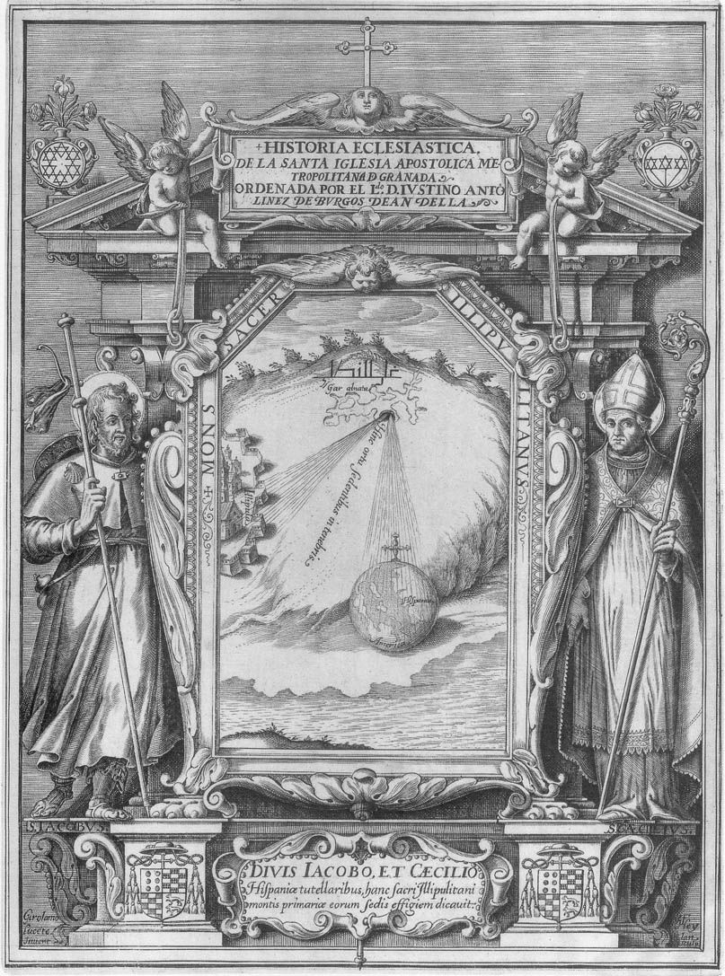 Historia eclesiástica de la Santa Iglesia Apostolica Metropolitana de Granada, ordenada por el Ldo. D. Iustino Antolinez de Burgos, dean della.